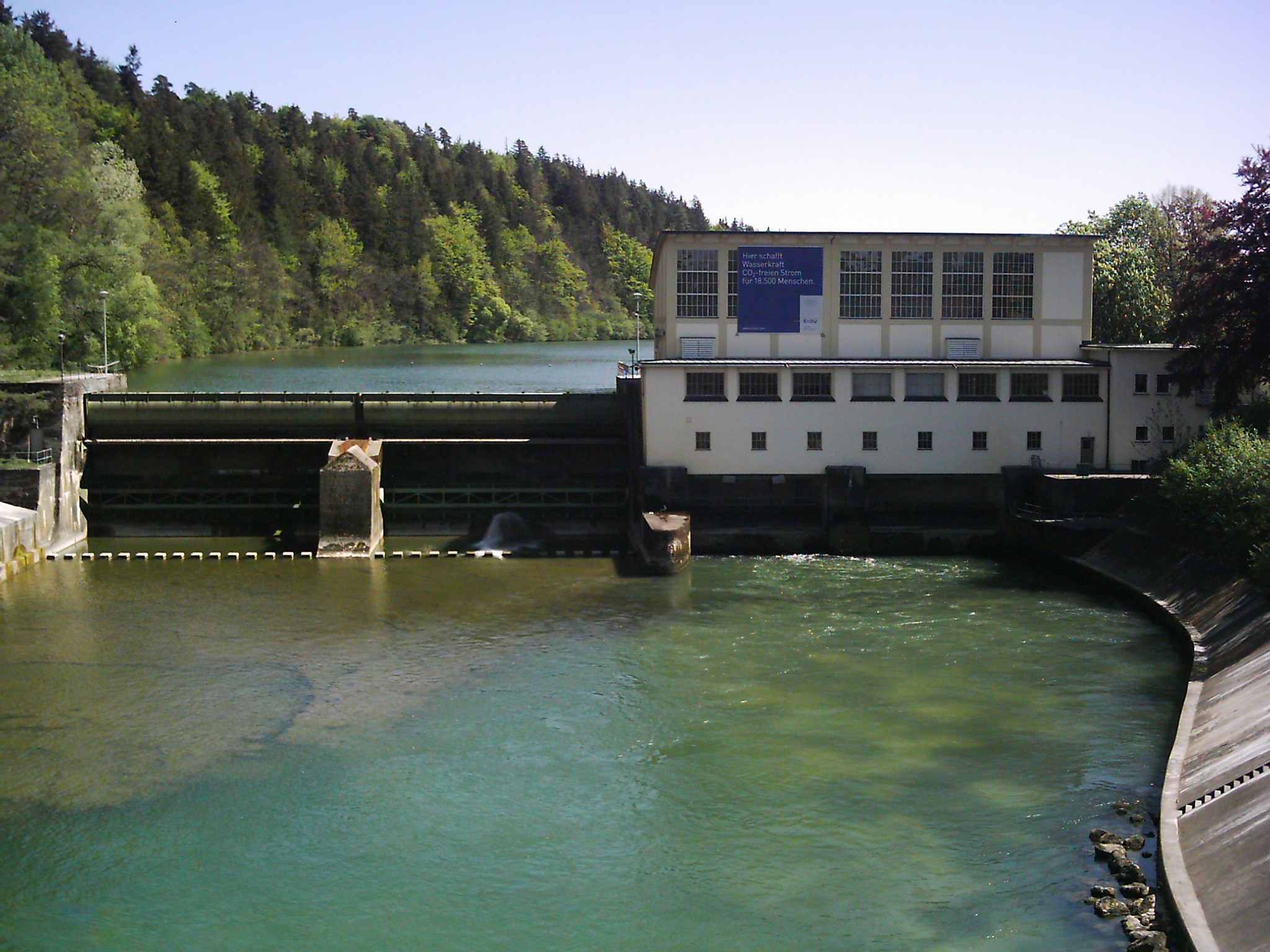 Illerkraftwerk bei 88319 Aitrach, Baden-Württemberg, Deutschland